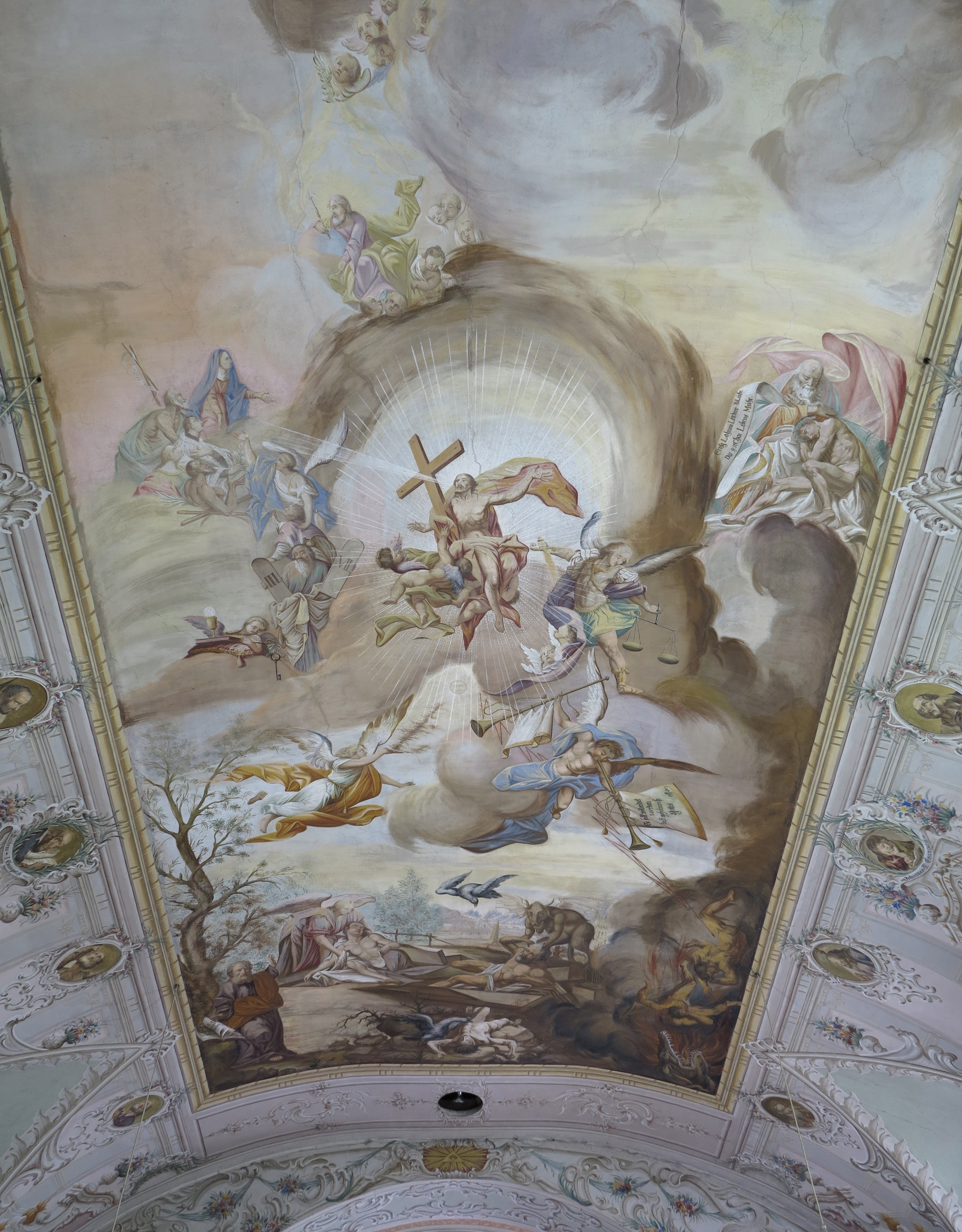 Deckenausmalung in der Pfarrkirche Elmen von Anton Köpfle, 1801/1802